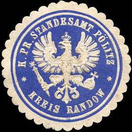 Sealing stamp Title: Königlich Preussische Standesamt Pölitz - Kreis Randow Description: blau, weiß, geprägt Place: Pölitz size: 4 cm